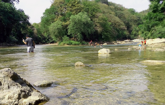 Río de Huehuetonoc, Gro.